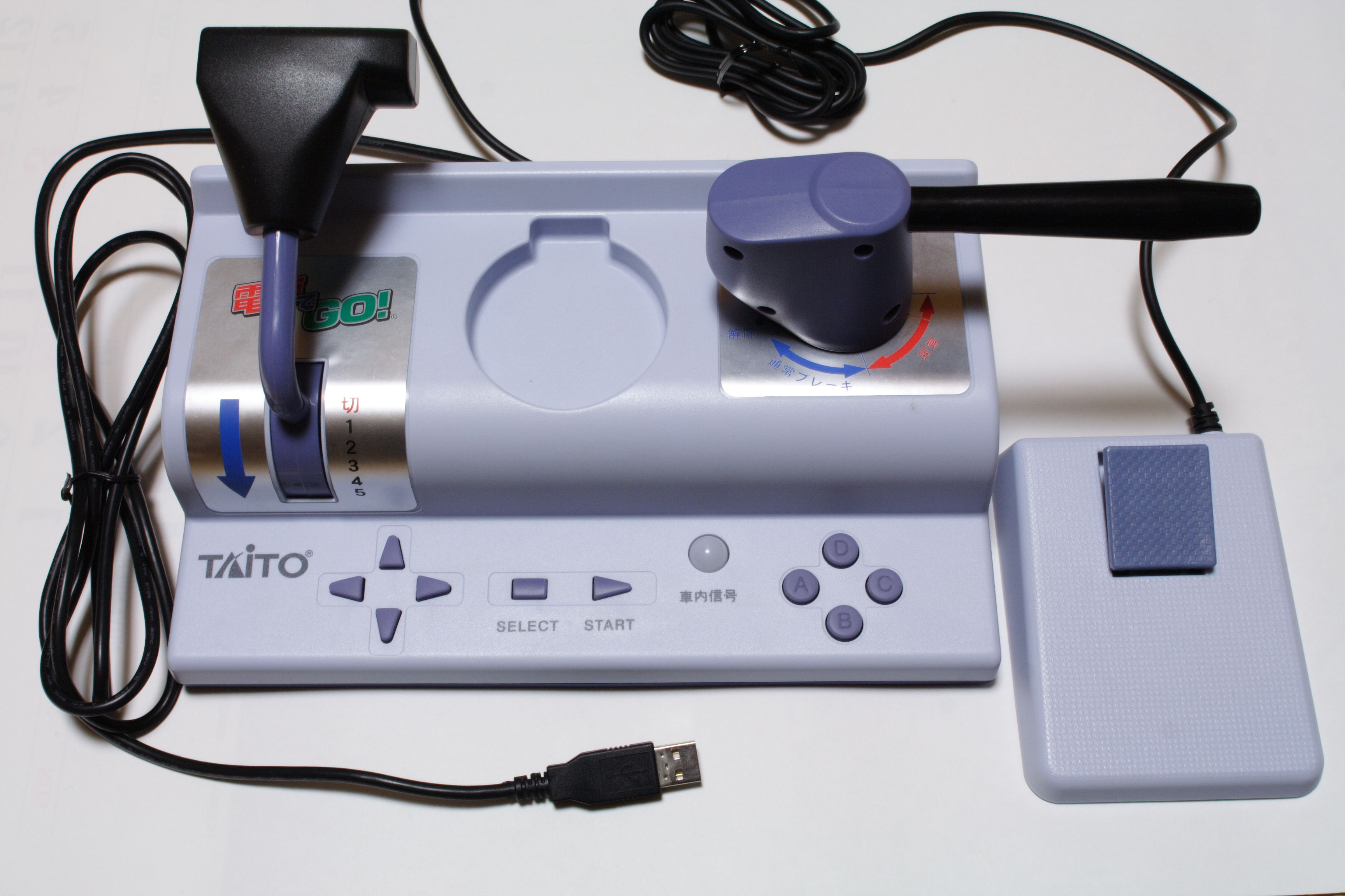 電車でGO!コントローラTYPE2 (C) TAITO Corp. 2001